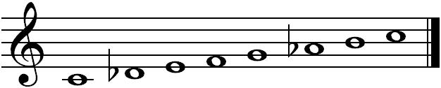 koobak